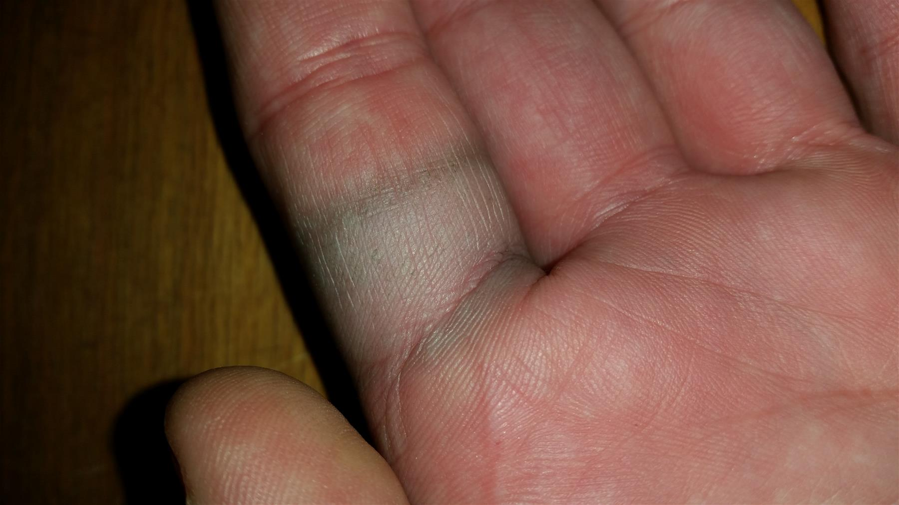 Tyischer Abrieb eines Corinthium aes-Ringes mit Dunkelfärbung der entsprechenden Hautpartie, hier Finger.